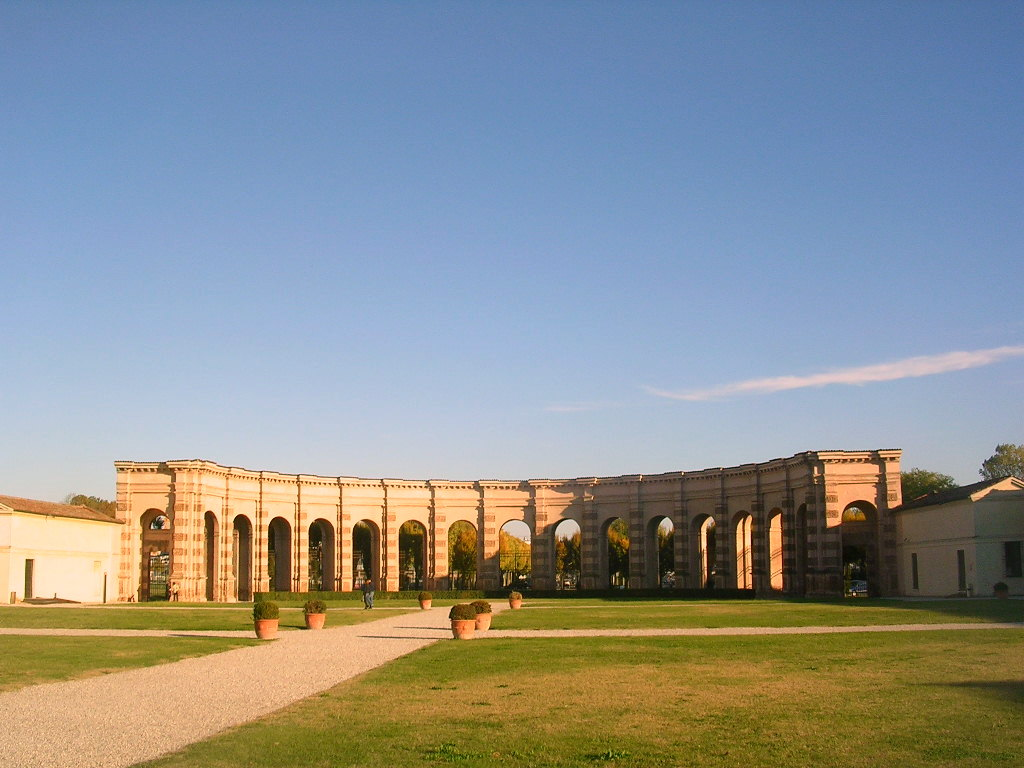 L'eedra di palazzo te in mantova.